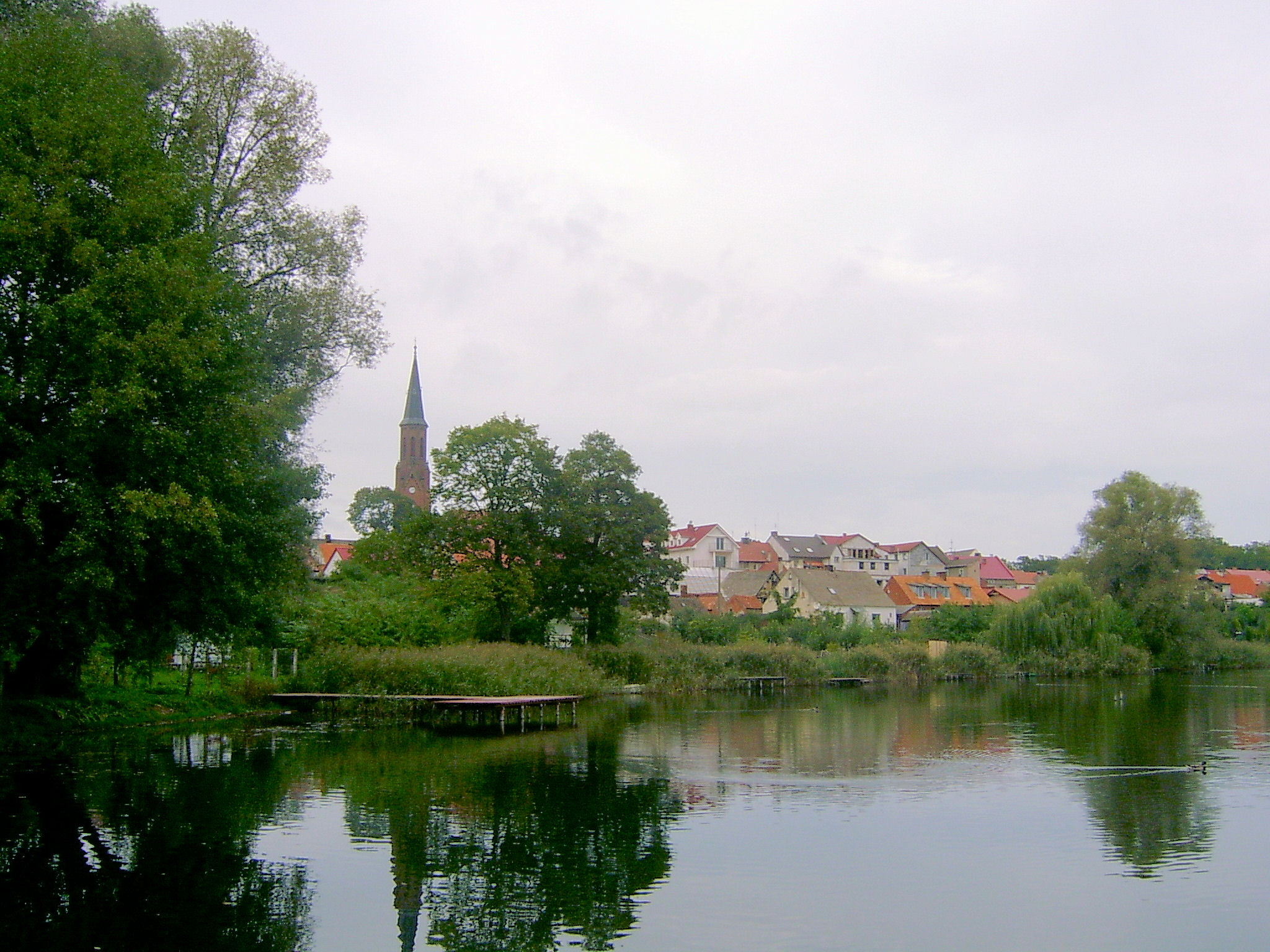 Jezioro Krajnik w Lubniewicach.